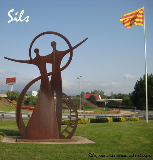 Bandera a l'entrada de Sils